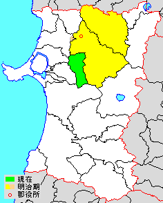 Map of Kitaakita District, Akita, Japan